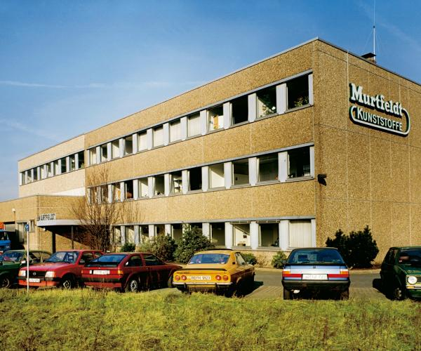 Verwaltungsgebäude der Firma Murtfeldt Kunststoffe in den 1970er Jahren am heutigen Standort in Dortmund-Brackel.